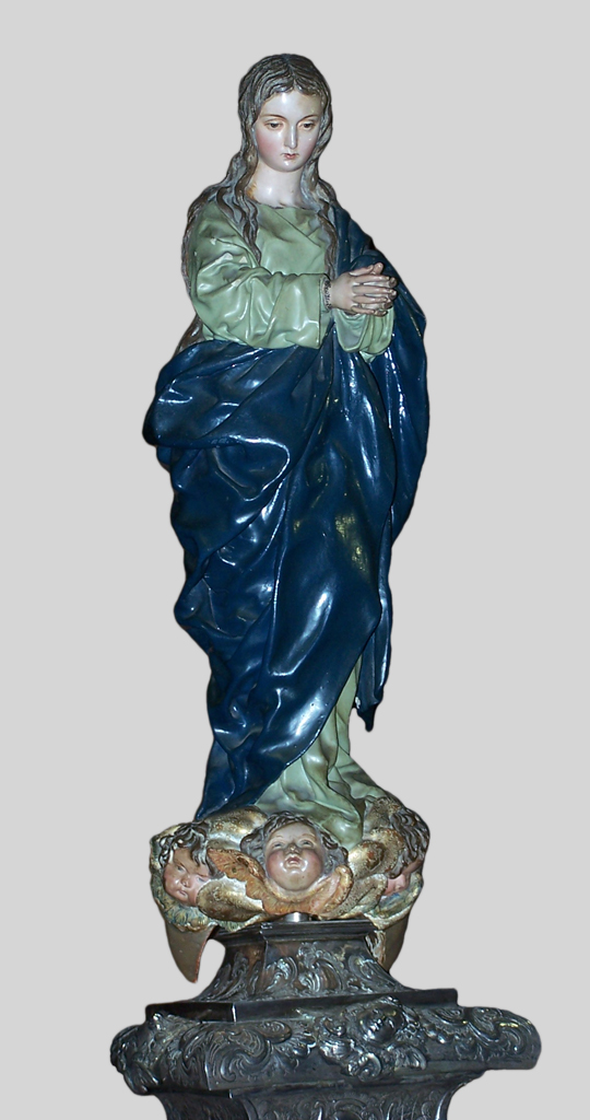 Inmaculada del fascistol. Alonso Cano. Sacristía de la Catedral de Granada.